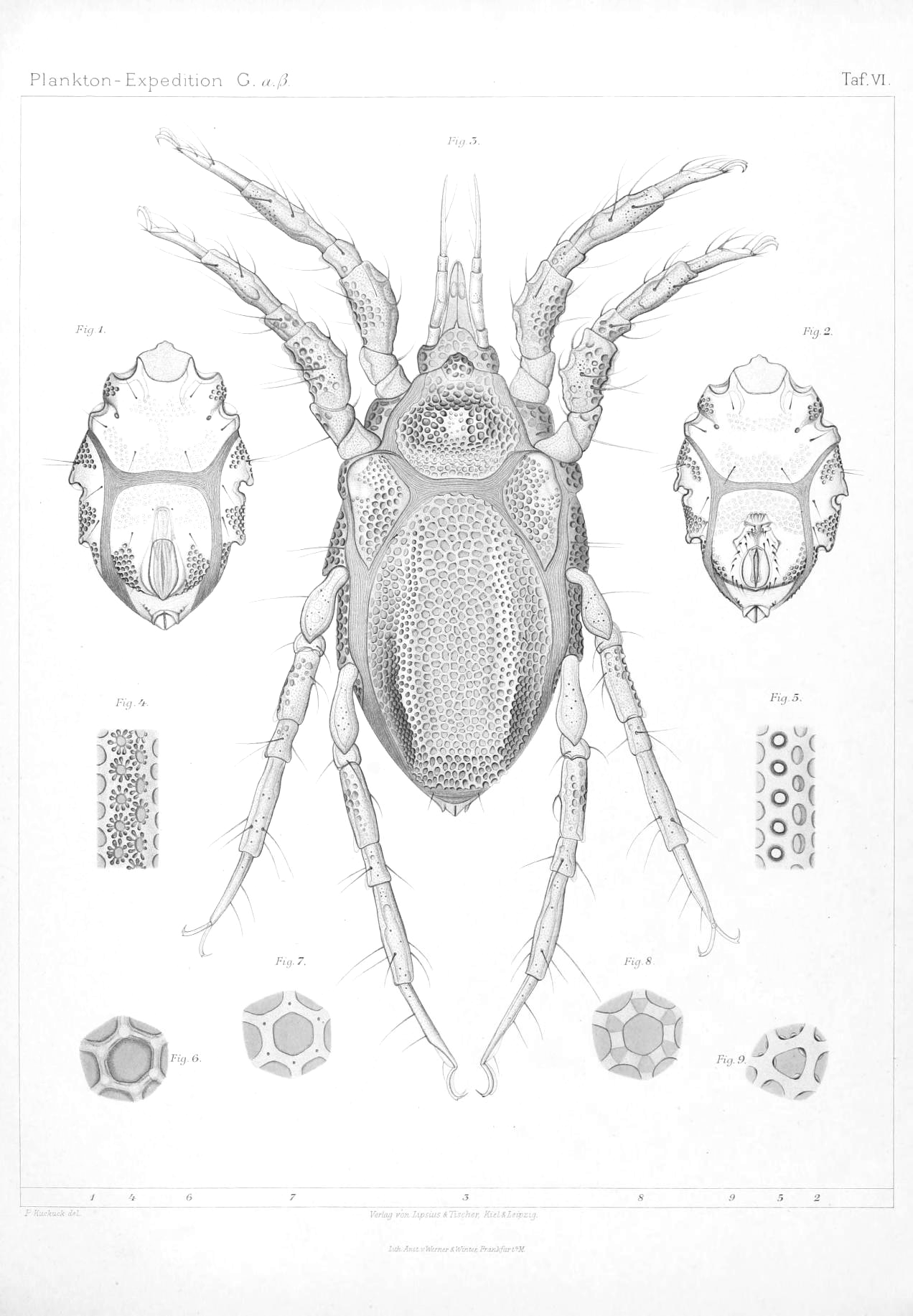 Die Morphologie der Copidognathus lamellosus (Acari: Halacaridae). 1–3, 9 – von der brasilianischen Küste, 4–8 – von den Bermuden. Weibchen, Bauchansicht. ×222 Männchen, Bauchansicht. ×222 Rückenansicht des ganzen Thieres. ×433. Panzerstück vom Längsstreifen der hinteren Dorsalplatte, tiefe Einstellung. ×1500. Panzerstück vom Längsstreifen der hinteren Dorsalplatte, hohe Einstellung. ×1500. Einzelnes Feld von der Fläche der hinteren Dorsalplatte, hohe Einstellung. ×2533. Einzelnes Feld von der Fläche der hinteren Dorsalplatte, mittlere Einstellung. ×2533. Einzelnes Feld von der Fläche der hinteren Dorsalplatte, tiefe Einstellung. ×2533. Einzelnes Feld von der Fläche der hinteren Dorsalplatte. ×2533.